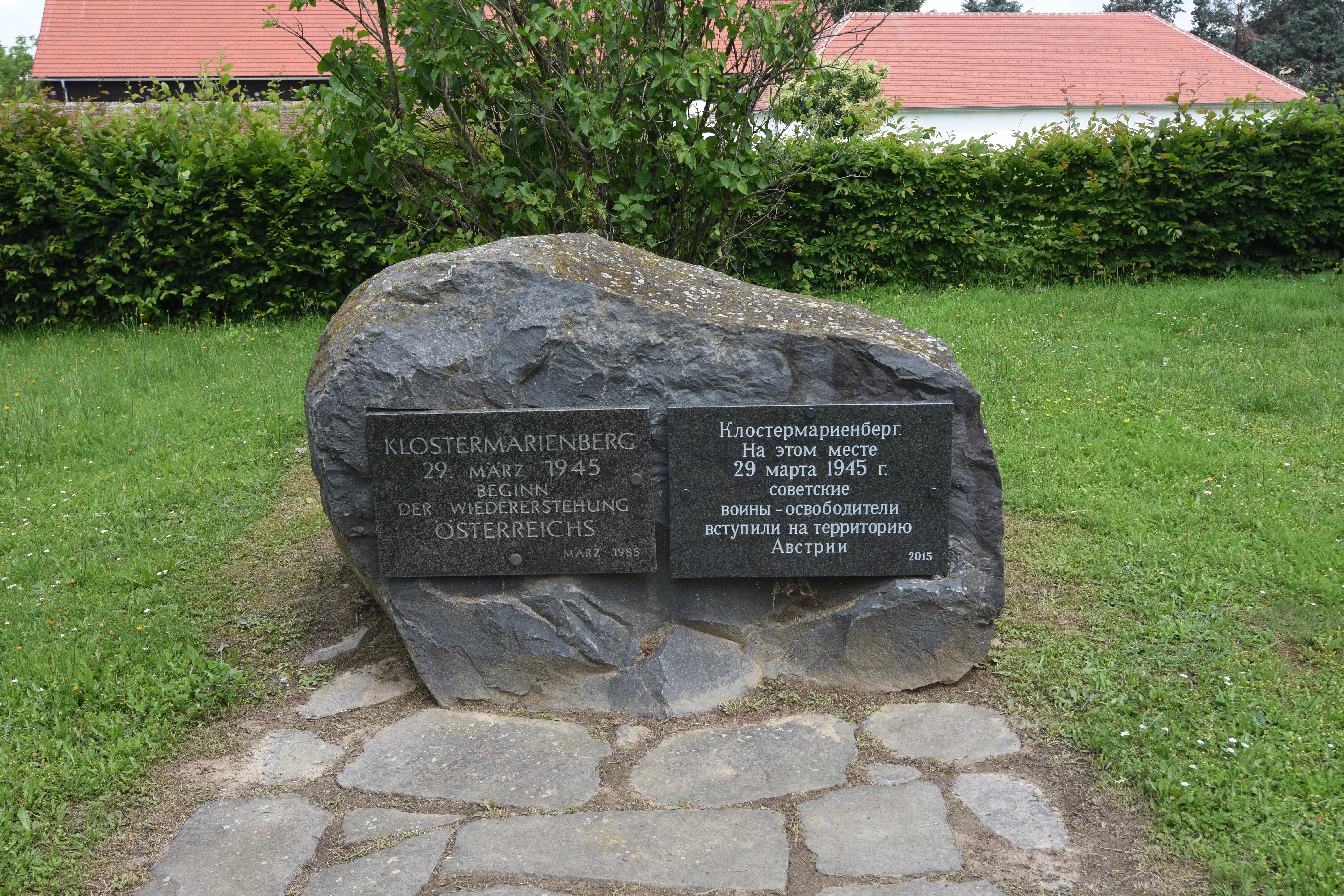 Gedenkstätte zum Zweiten Weltkrieg Klostermarienberg